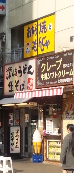 讃岐うどんと生そばの看板、東京都新宿区にて、2012年